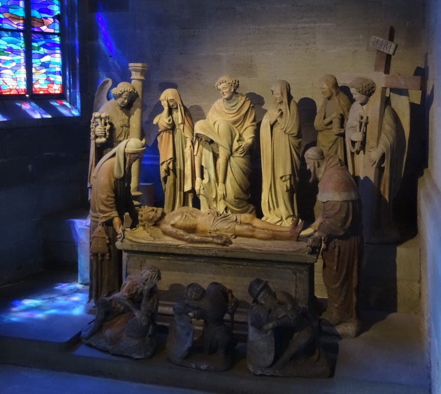 Cathédrale St-Nicolas de Fribourg (Suisse). Mise au tombeau de la chapelle du Saint-Sépulcre.